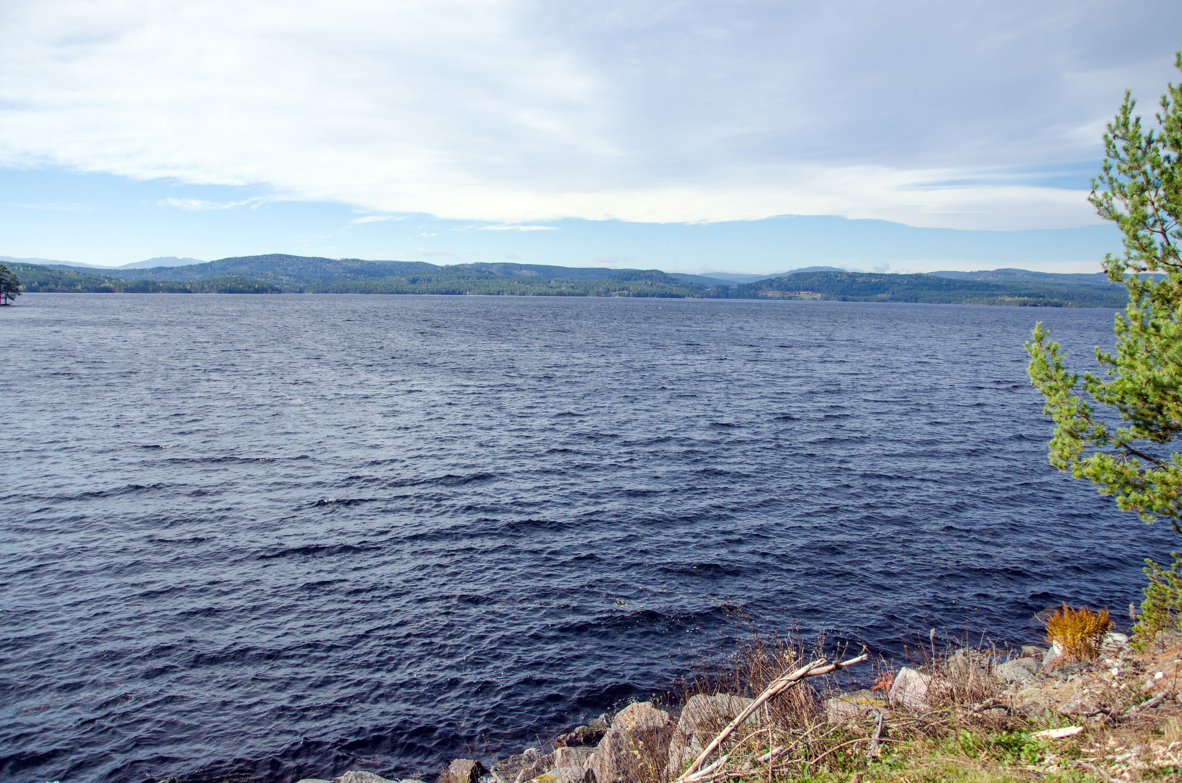 Follsjå (Follsjø) sett fra Follsjøvegen i Notodden kommune